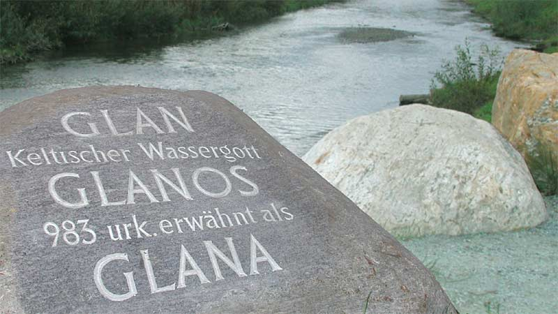 Im Glanpark der Landeshauptstadt Klagenfurt befindet sich ein Stein mit der Aufschrift: GLAN / Keltischer Wassergott GLANOS / 983 urk. erwähnt als GLANA